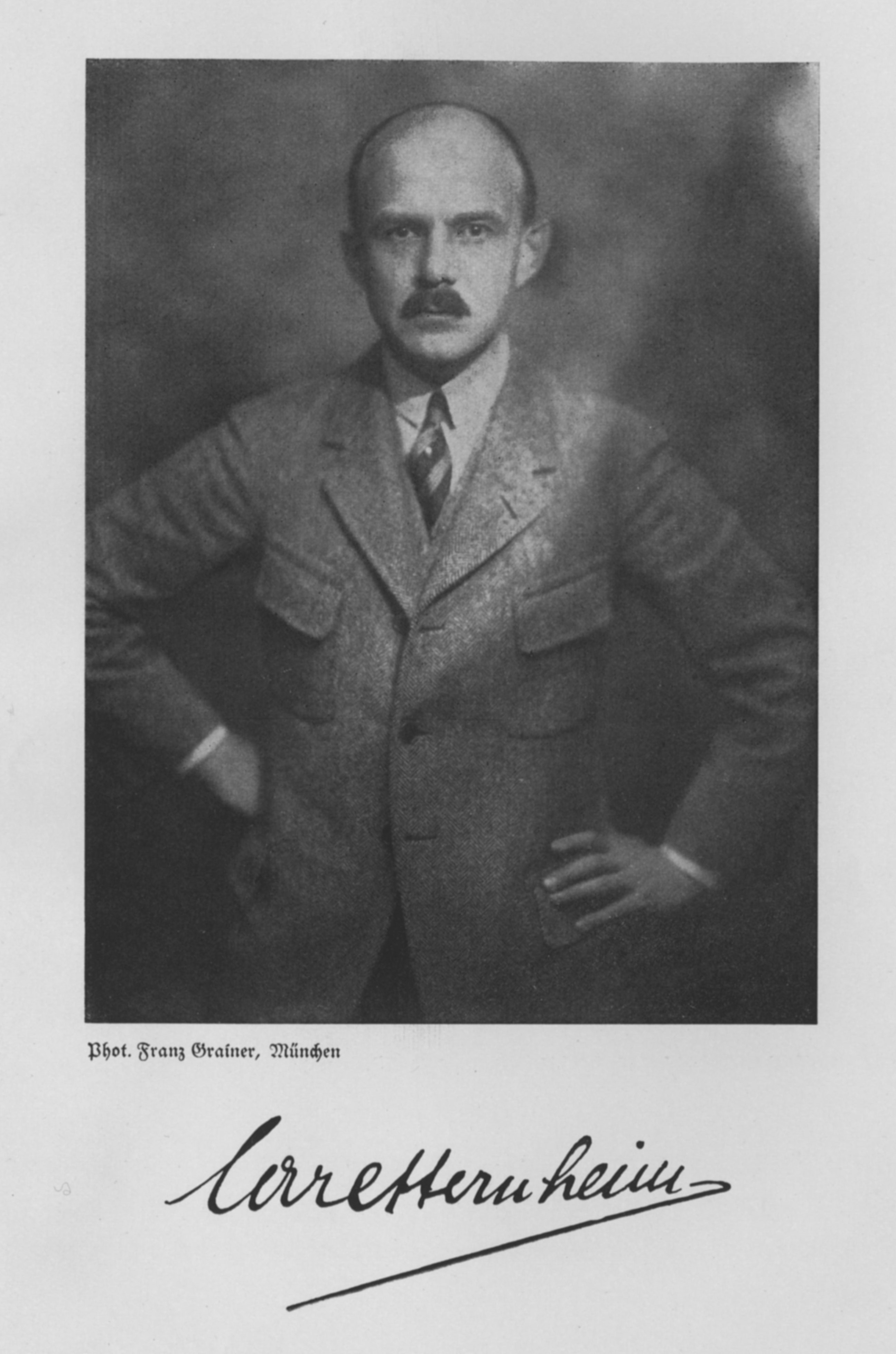 Carl Sternheim (aus: Die deutsche Literatur unsrer Zeit, 1921)